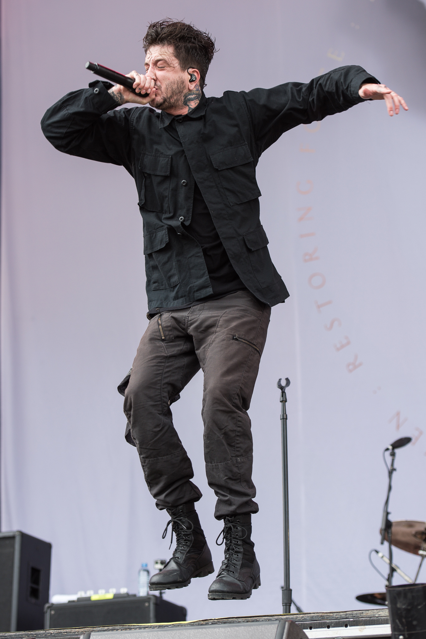 ARGO-Konzerte,Austin Carlile,Festival,Konzert,Livekonzert,Livemusik,Musik,Of Mice & Men,RiP,Rock im Park 2016,Seat Zeppelin Stage